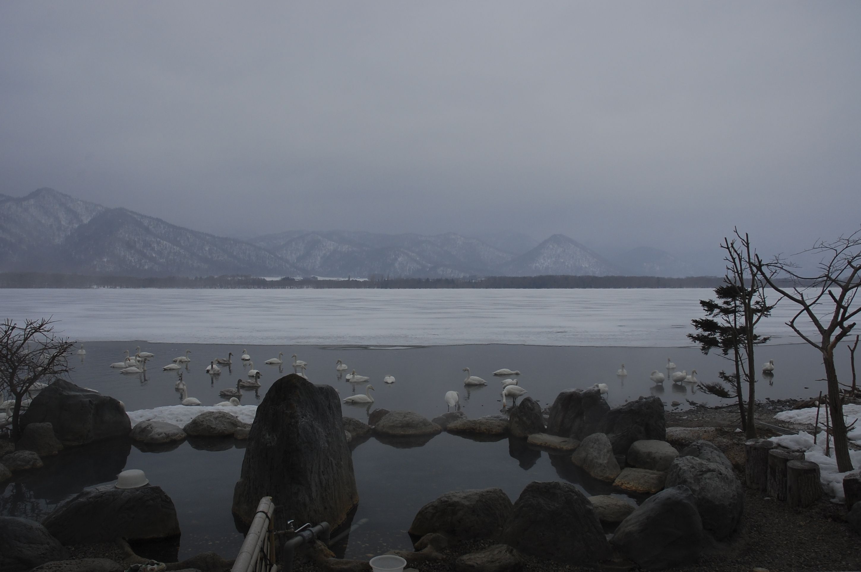 2月下旬のコタン温泉。